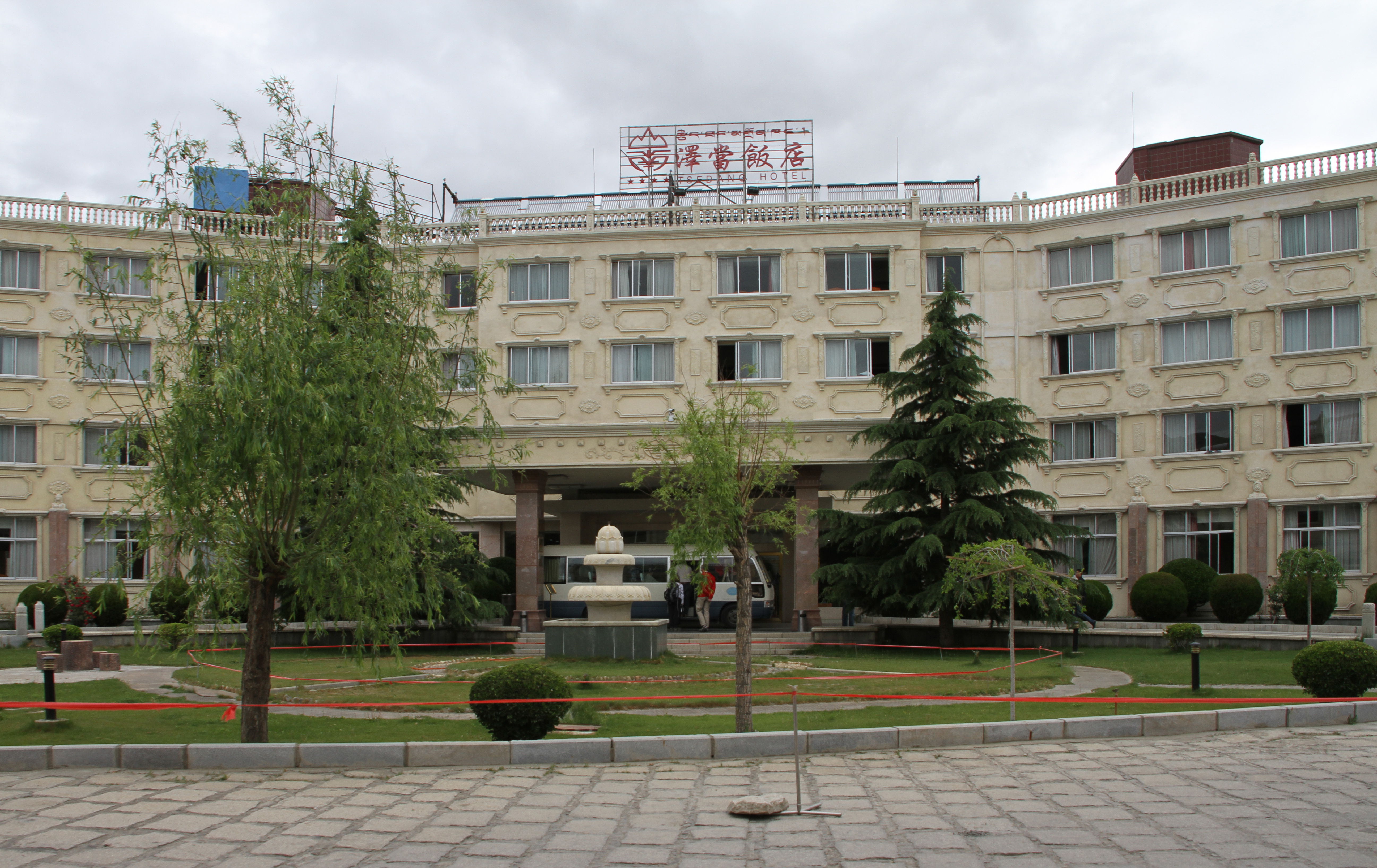 Tsetang-Hotel